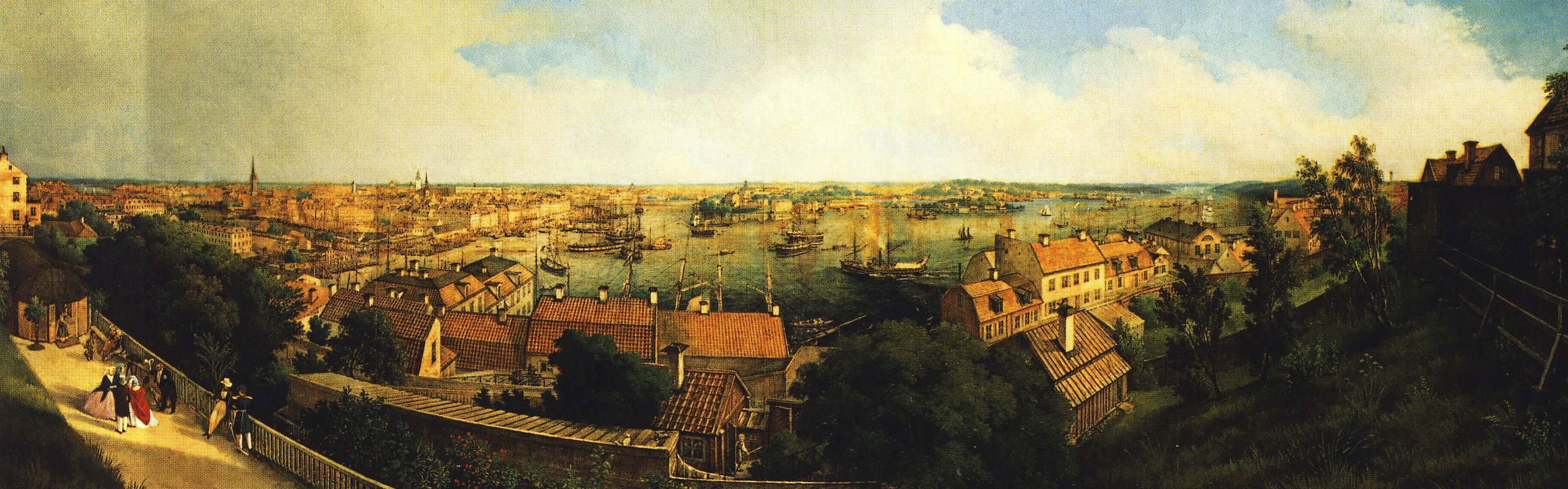 Utsikt över Stockholm från Mosebacke på Södermalm